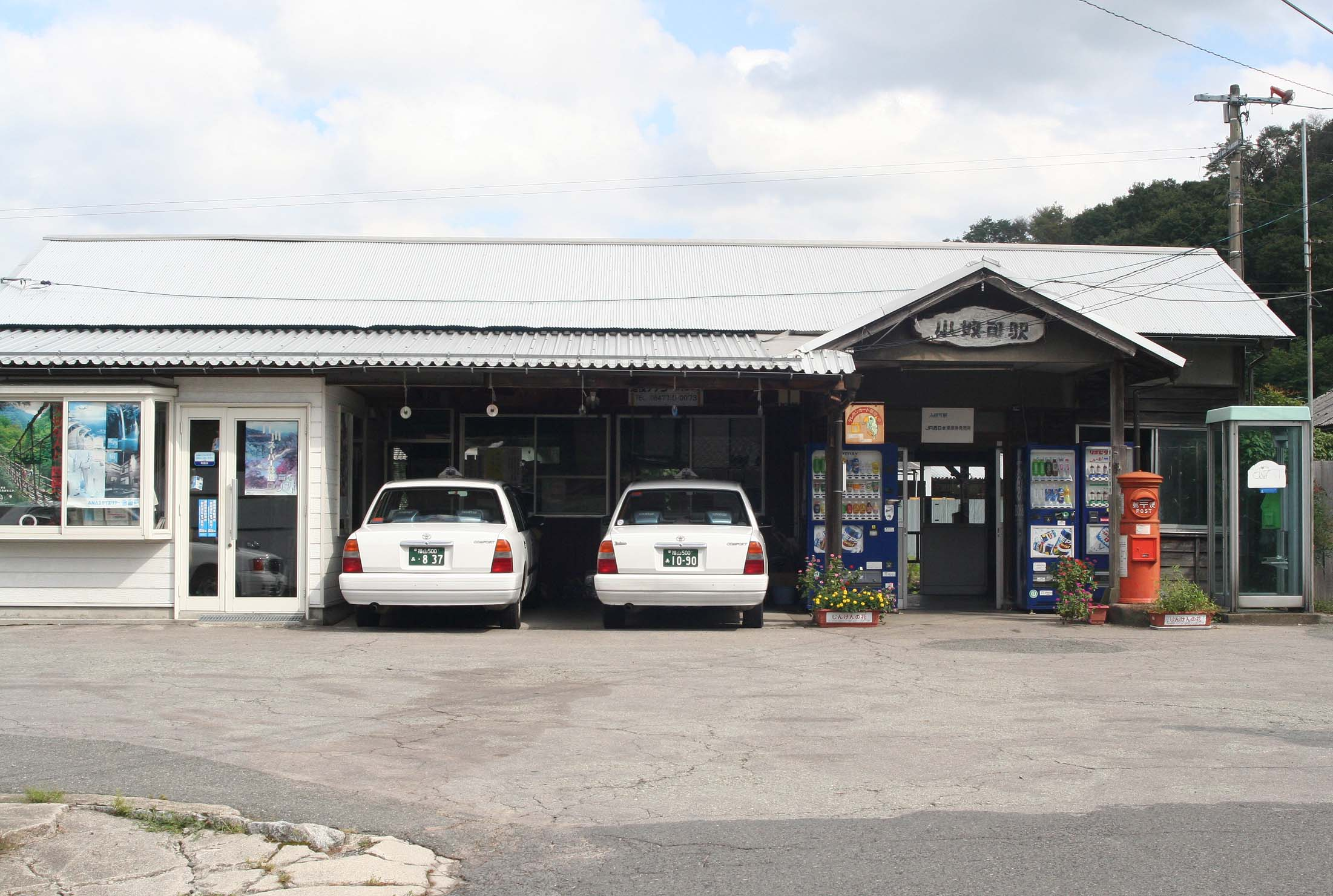 西日本旅客鉄道 小奴可駅の駅舎